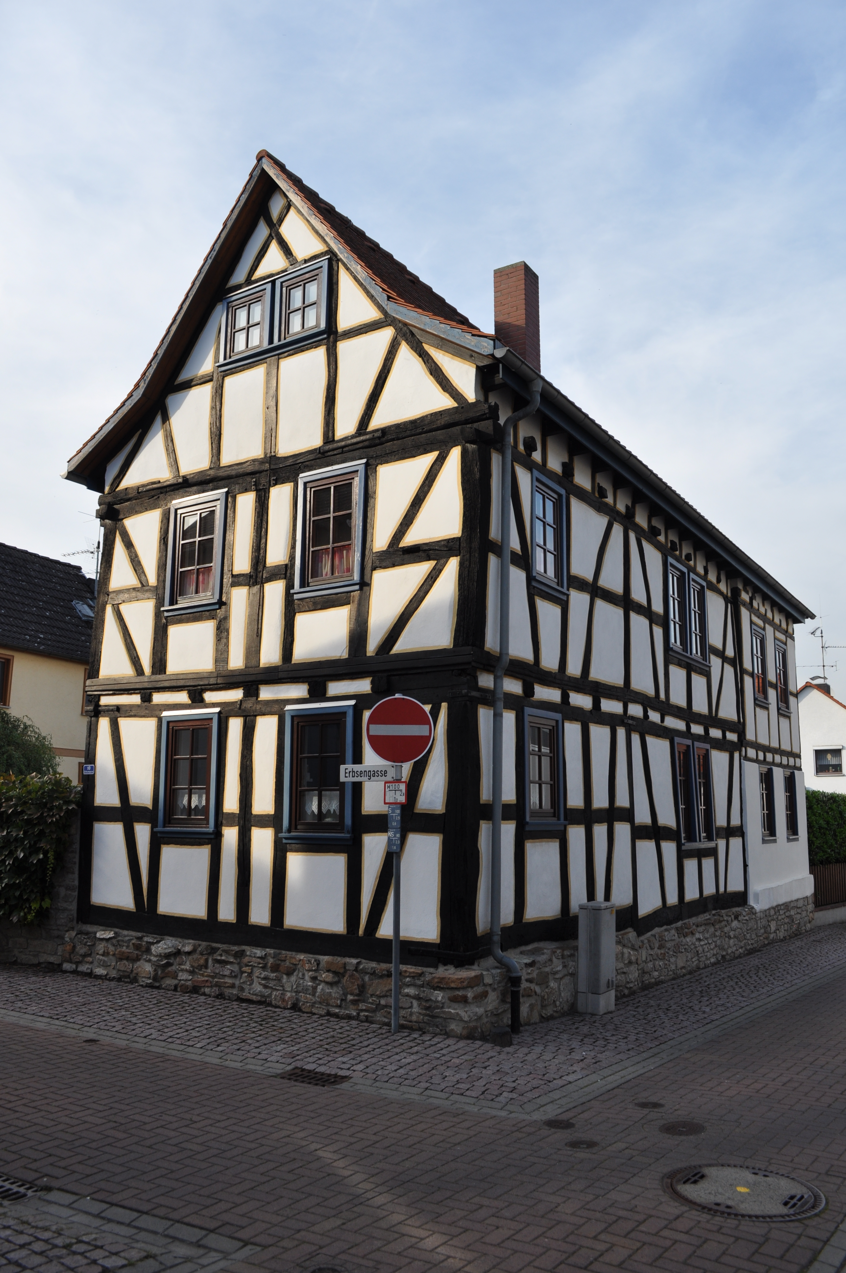 Das denkmalgeschützte Fachwerkhaus Erbsengasse 10 in Nieder-Rosbach